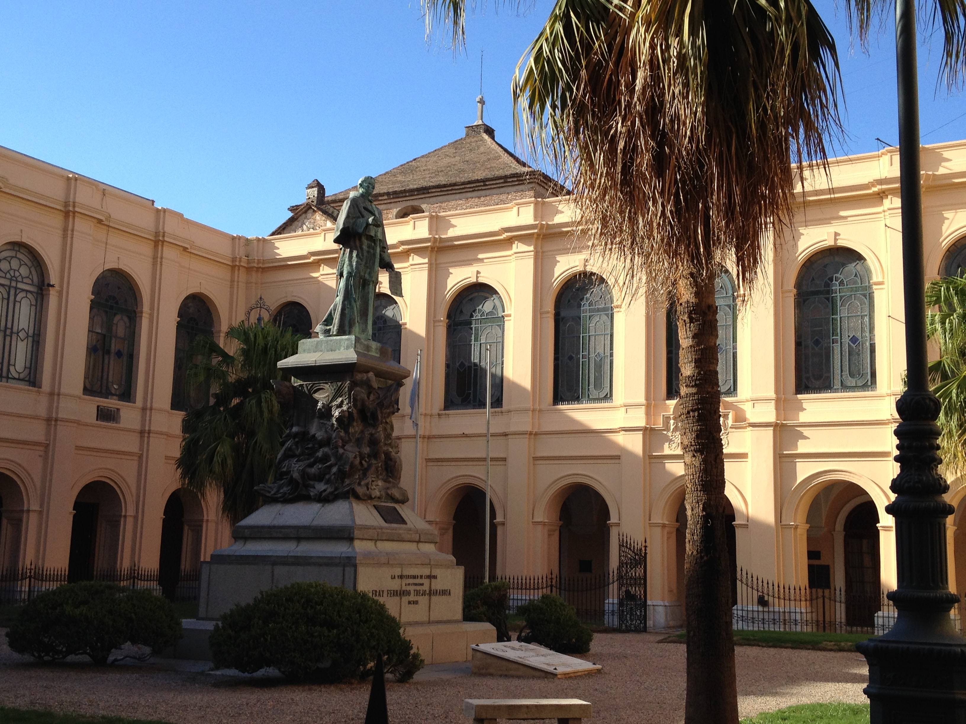 Interior de la Manzana Jesuítica - Universidad Nacional de Córdoba.